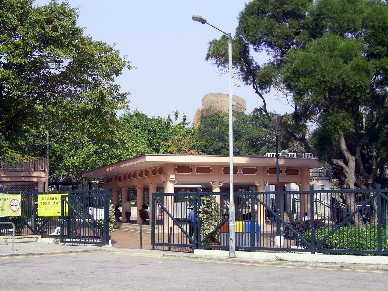 海心公園入口